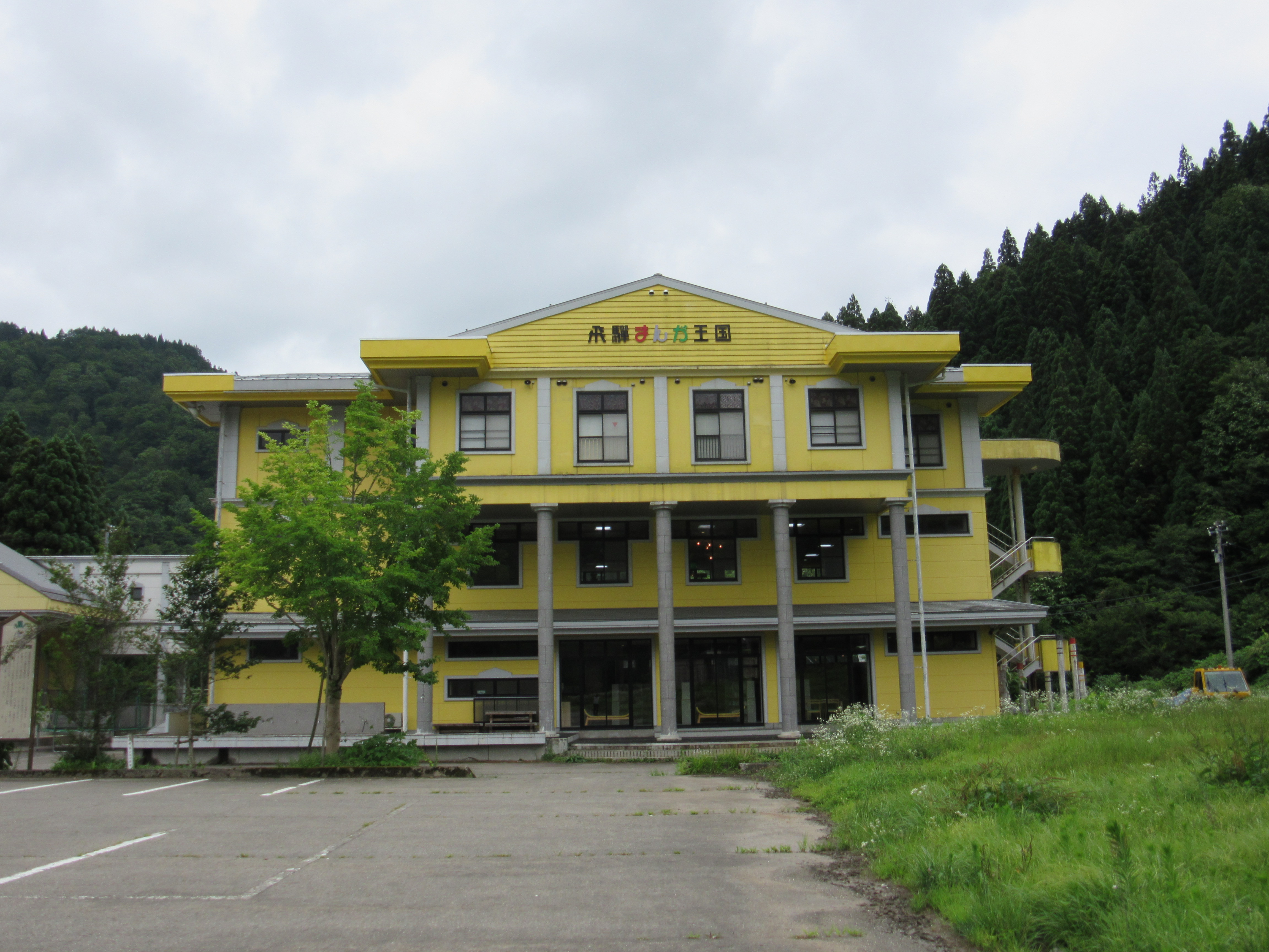 飛騨まんが王国